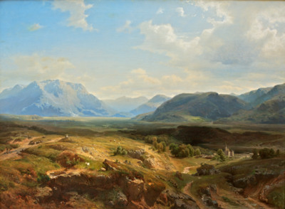 Voralpenlandschaft, 122 x 156 cm, Öl auf Leinwand